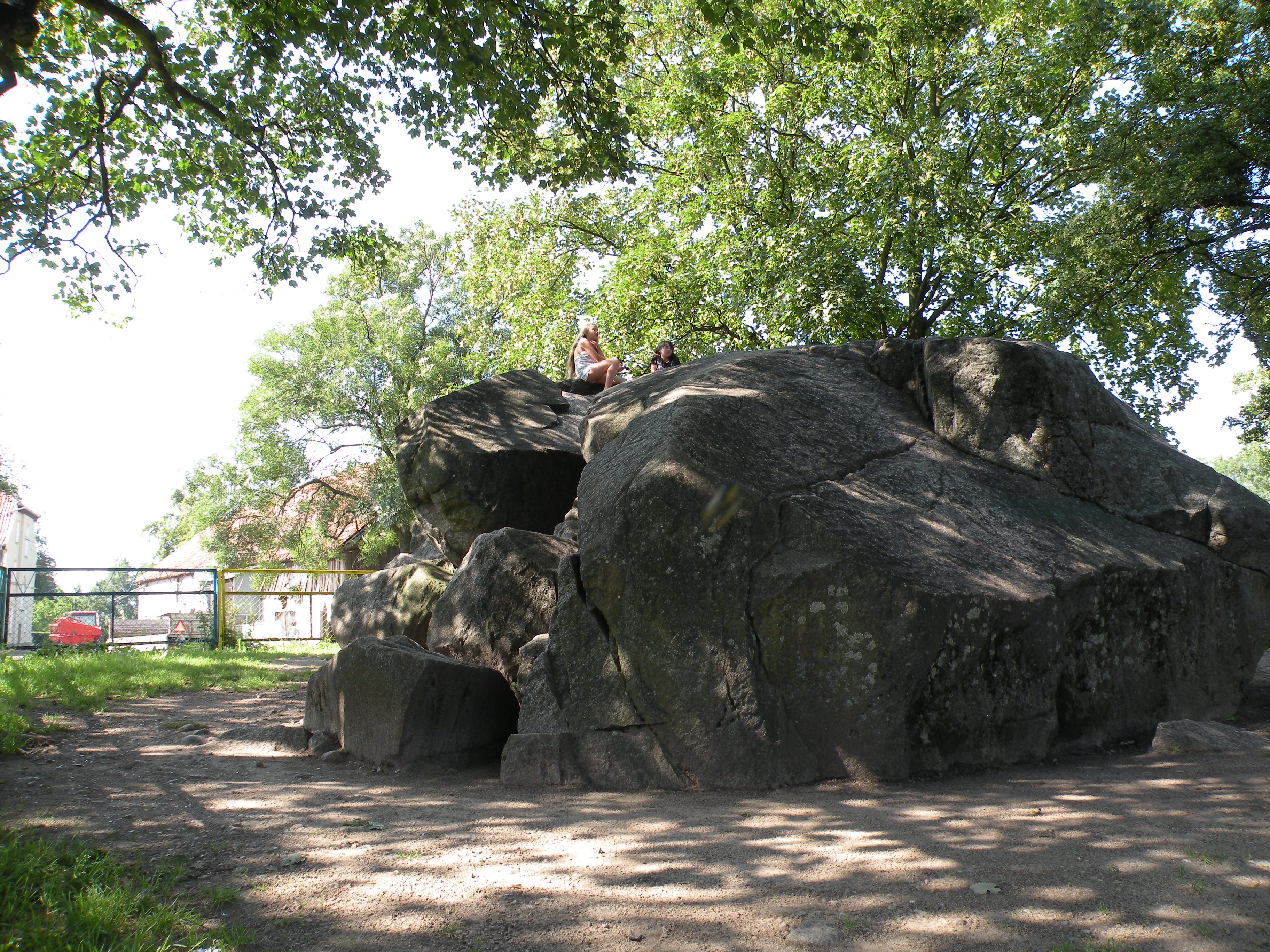 Głaz narzutowy w Bisztynku, "diabelski kamień"